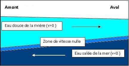 vitesse de courant